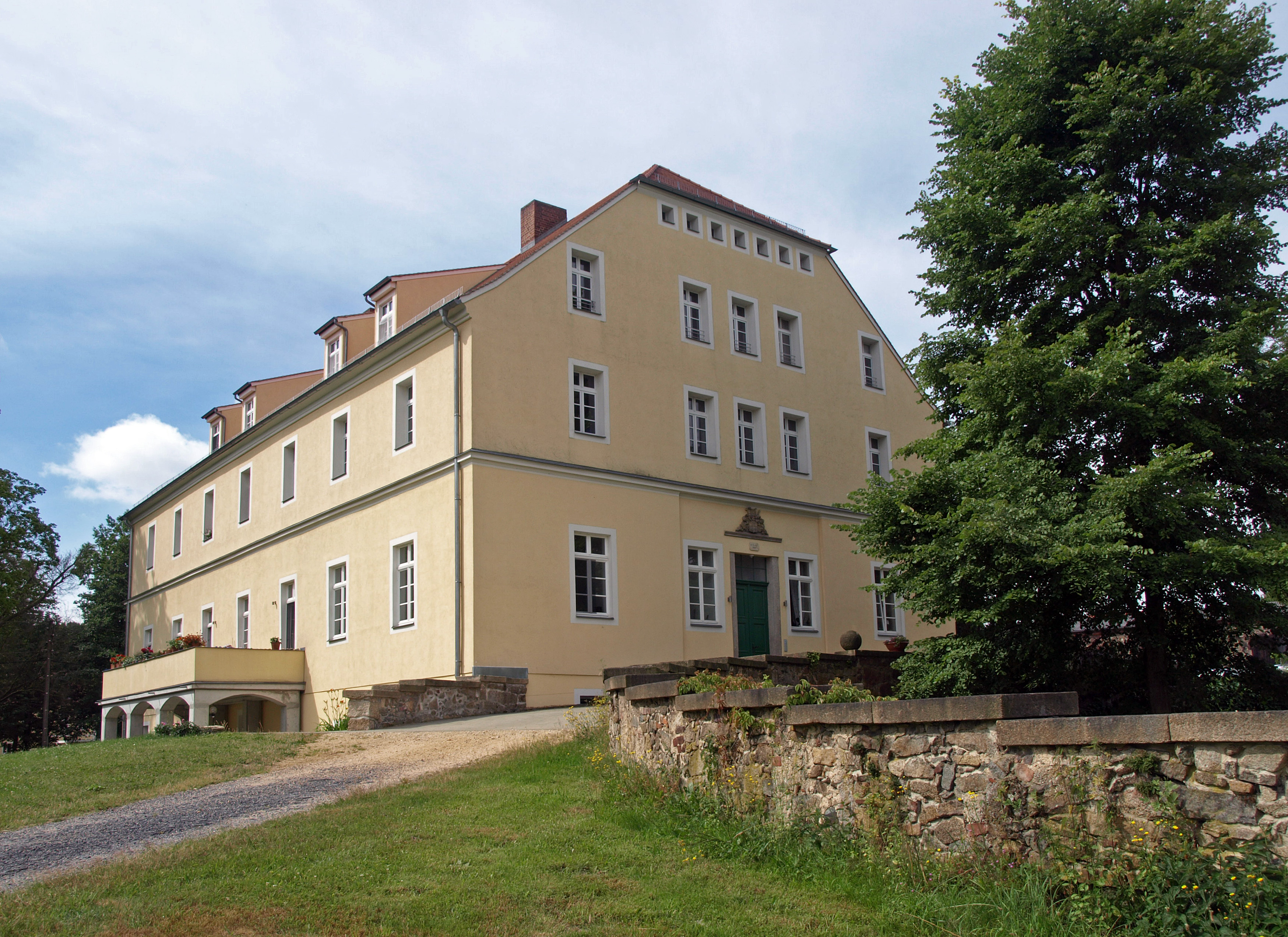 Herrenhaus Rittergut Arnsdorf